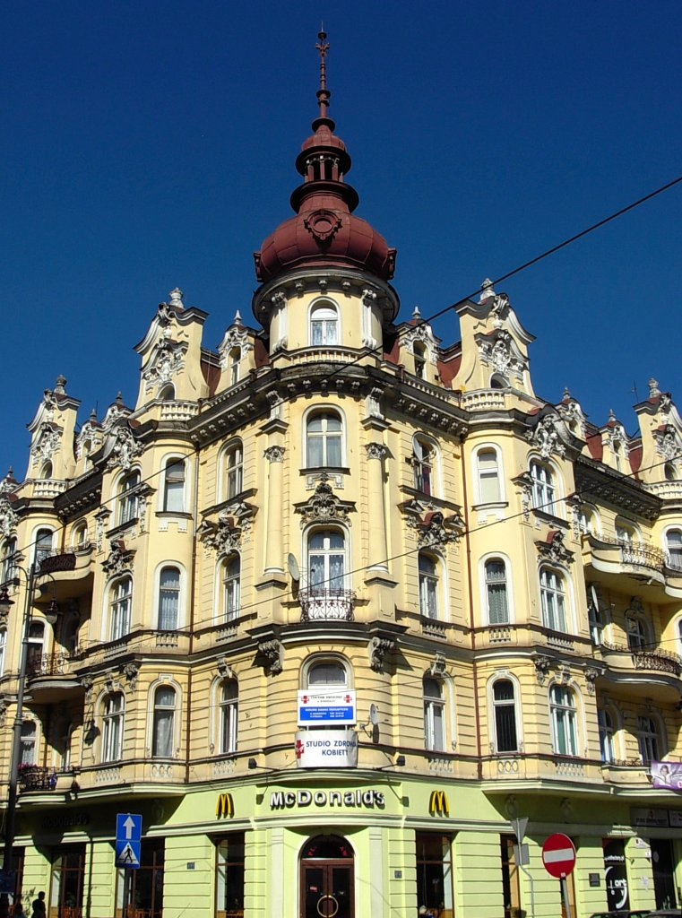 Kamienica neobarokowa Plac Wolności 1 w Bydgoszczy